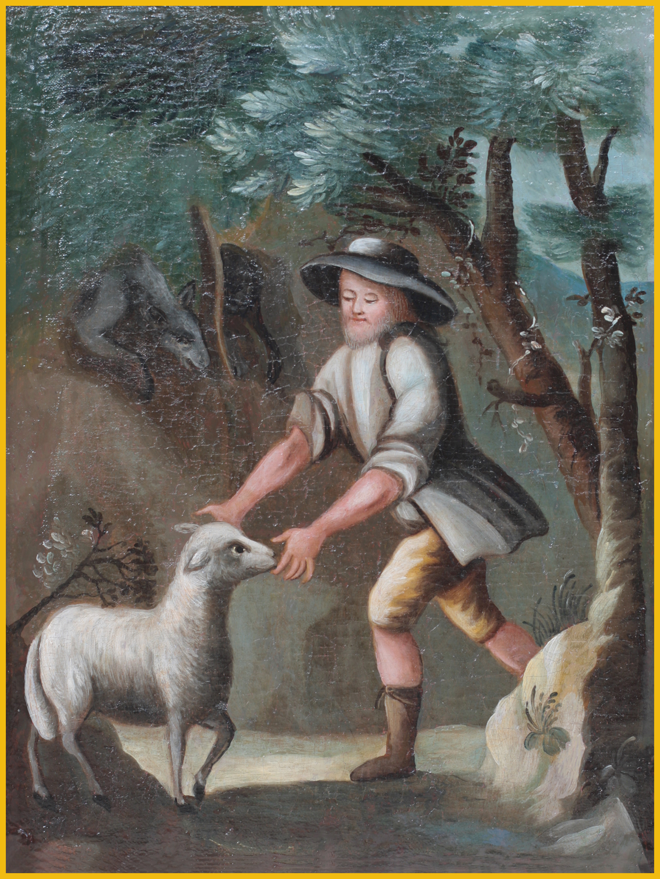 Emporenbild in der Ev. Kirche Atzbach, Gemeinde Lahnau, Hessen, Deutschland